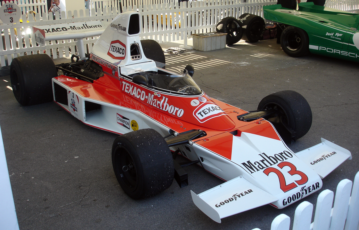 McLaren M23 d'Emerson Fittipaldi exposat al festival Martini Legends (commemoració del 75 aniversari del Circuit de Montjuïc)